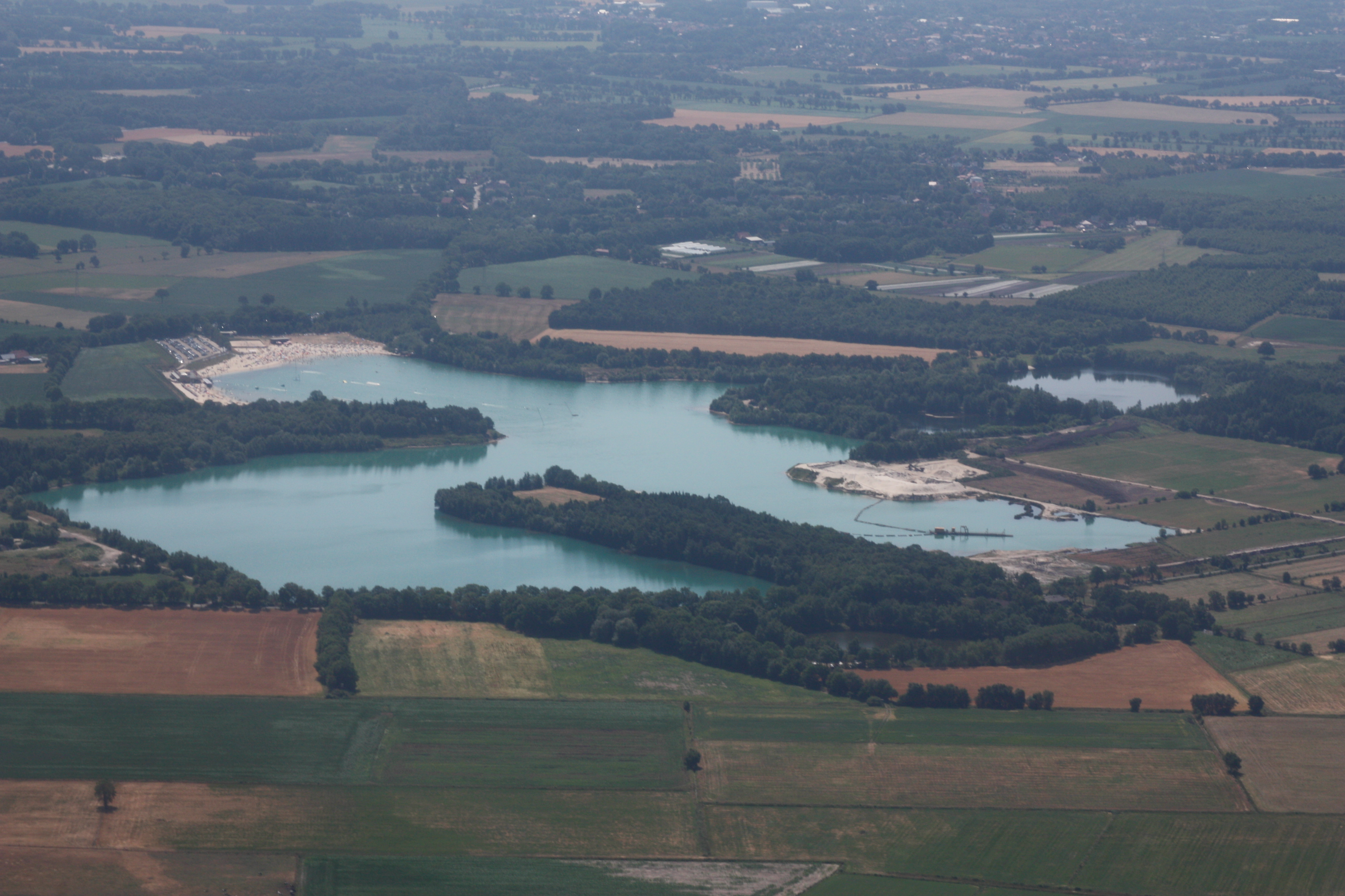 Flug über Rastede; von Varel kommend nach Oldenburg; Flughöhe 500 m = 1500 ft; Juli 2010